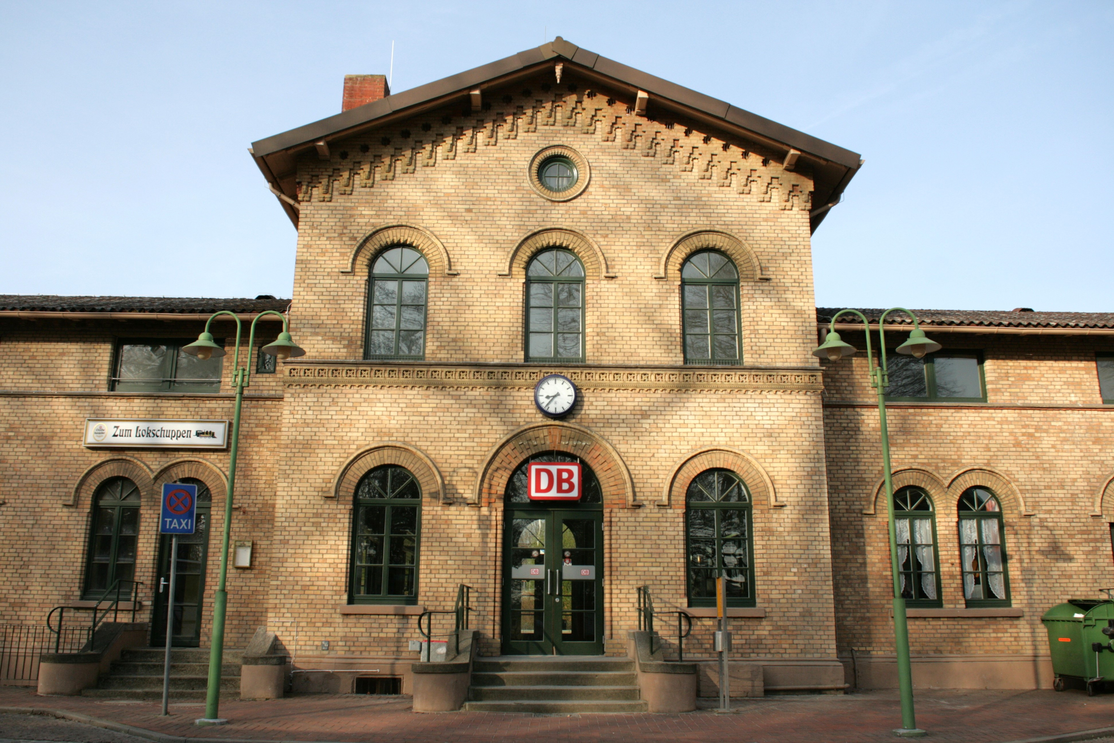 Bahnhof, Am Bahnhof in Bad Bevensen